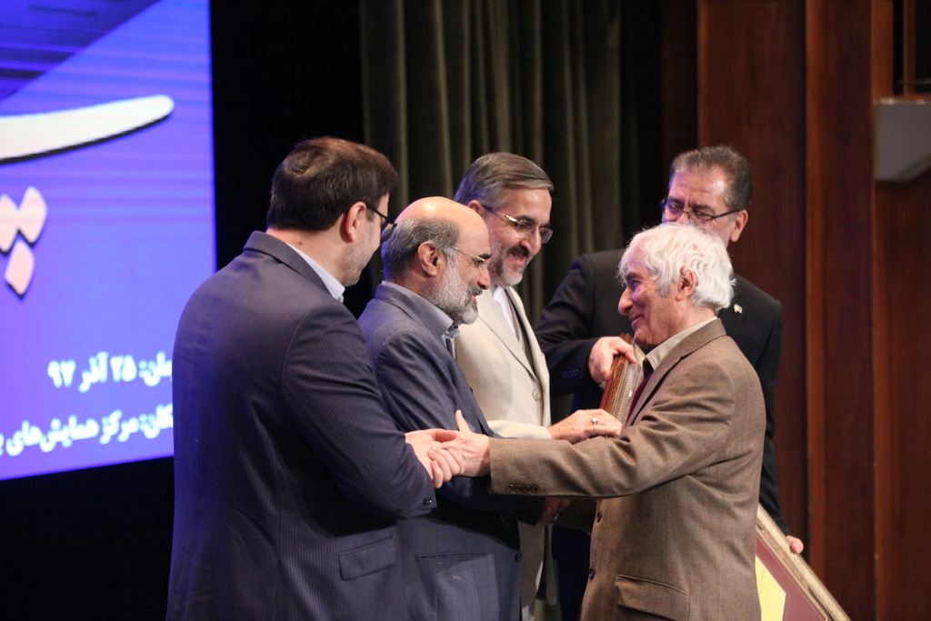 Morteza Kotobi